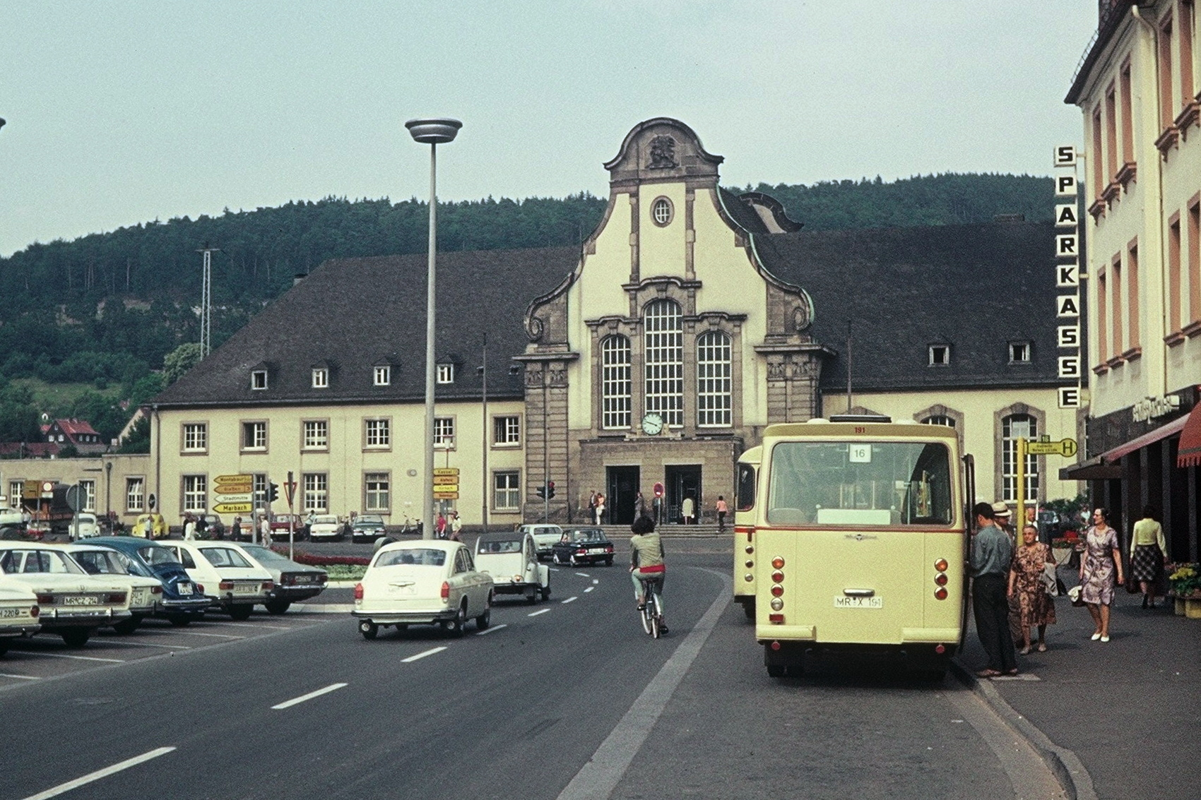 Marburg (Lahn). Bahnhof mit Kleinbus zum Schloss. Aufnahme von 1972.